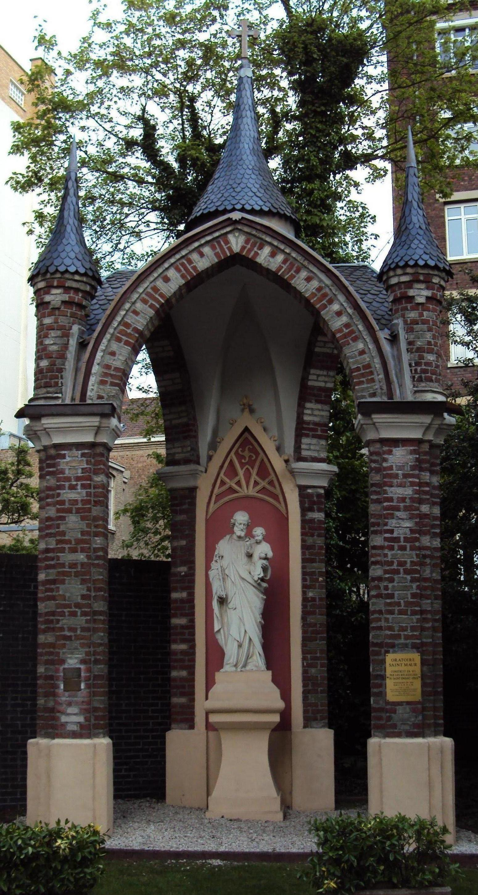 Oratoire Saint-Maur de Marcq-en-Barœul (France).